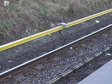 Derde rail bij metrostation Amsterdam Zuid.